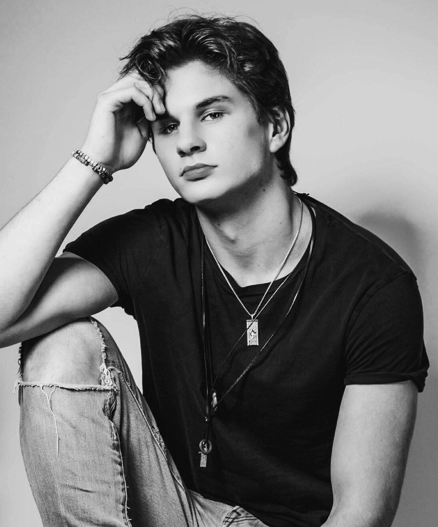 Foto vom Komponisten Falk Wünsch